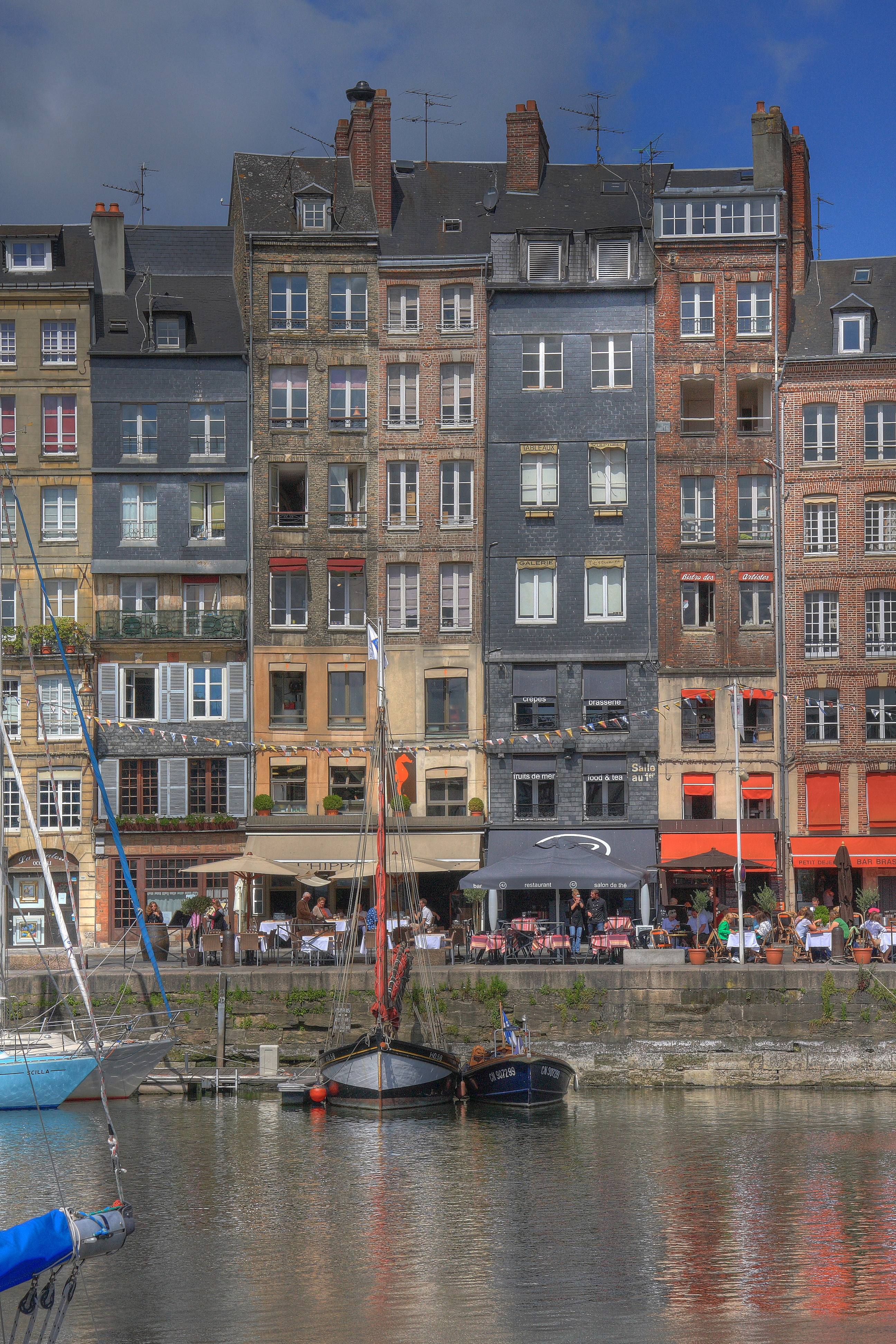 Les immeubles sur le port de Honfleur